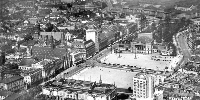 Goethestraße fliegerfoto 1913